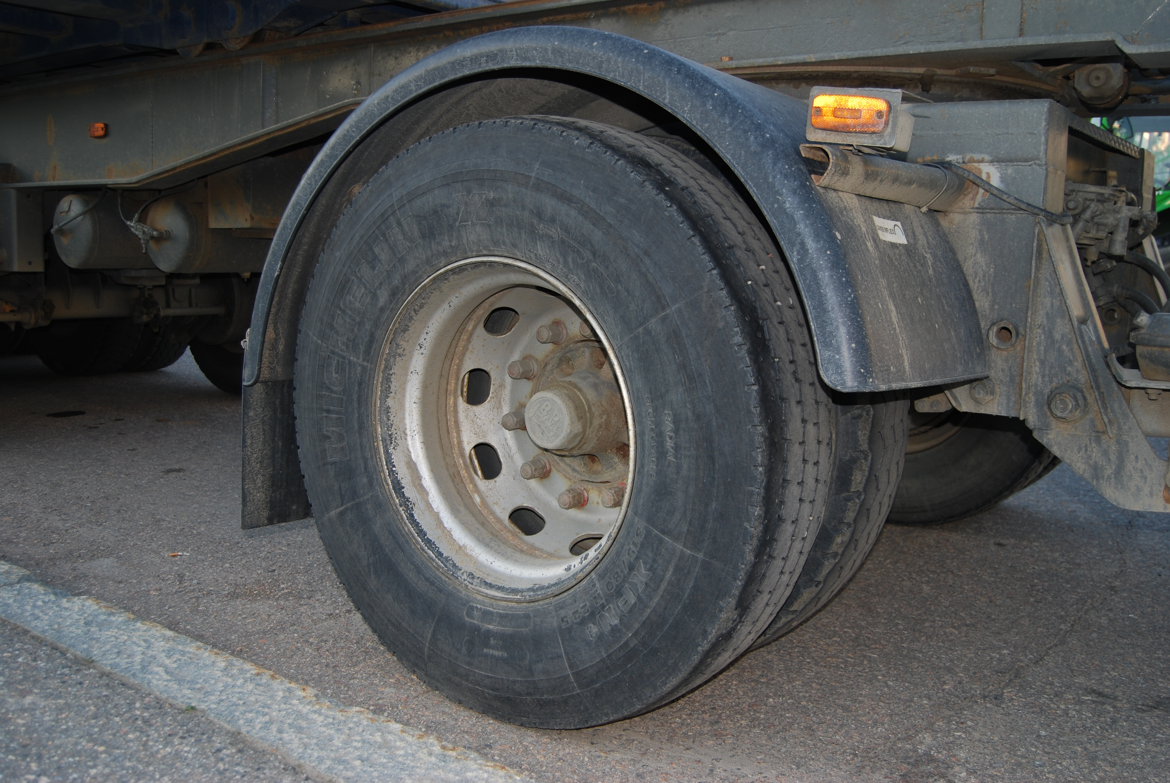 Dvojmontáž kol na přední nápravě přívěsu.